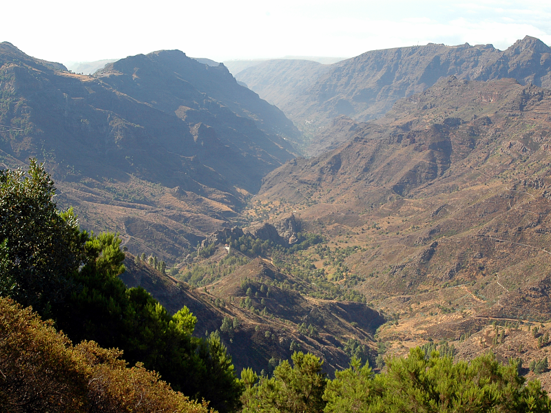 Valle de Alajeró, La Gomera (Canarias), desde el mirador Tanajaque